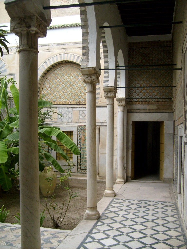 Cour du Dar Othman dans la médina de Tunis (Tunisie)